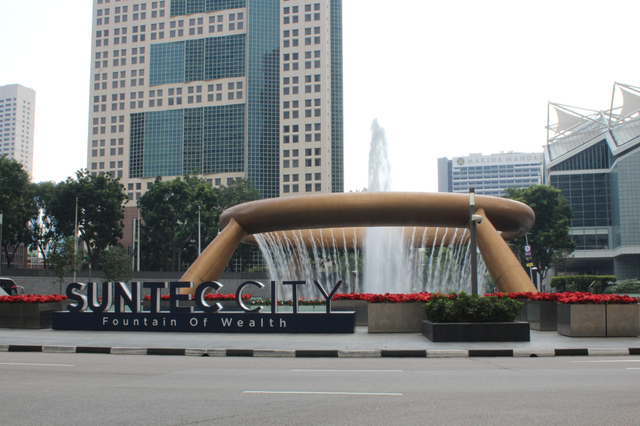 Skulpturen im Bürgermeistergarten